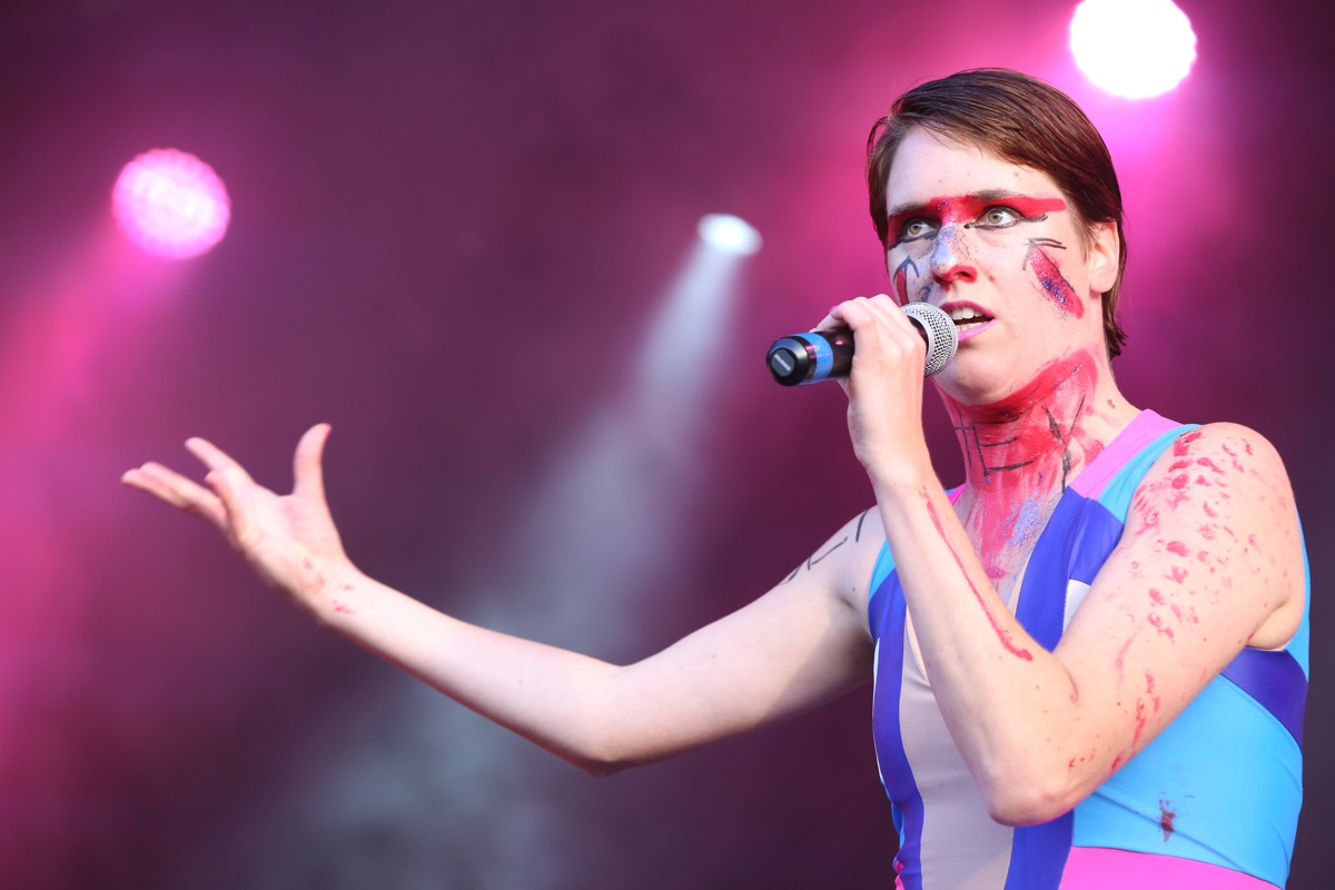 Optreden Kenji Minogue, Genk On Stage, 29/06/2014.